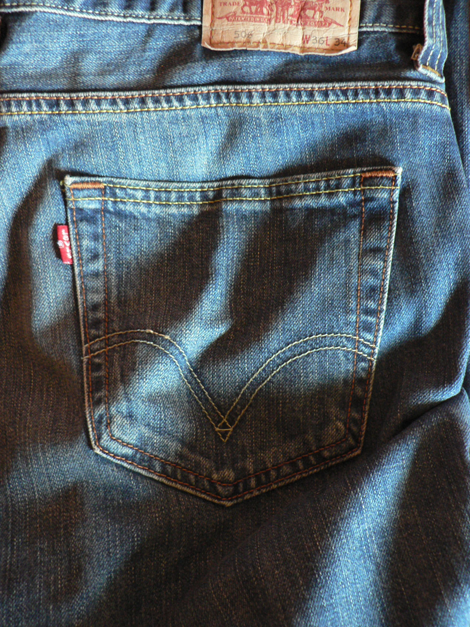 Levi's 506 jeans